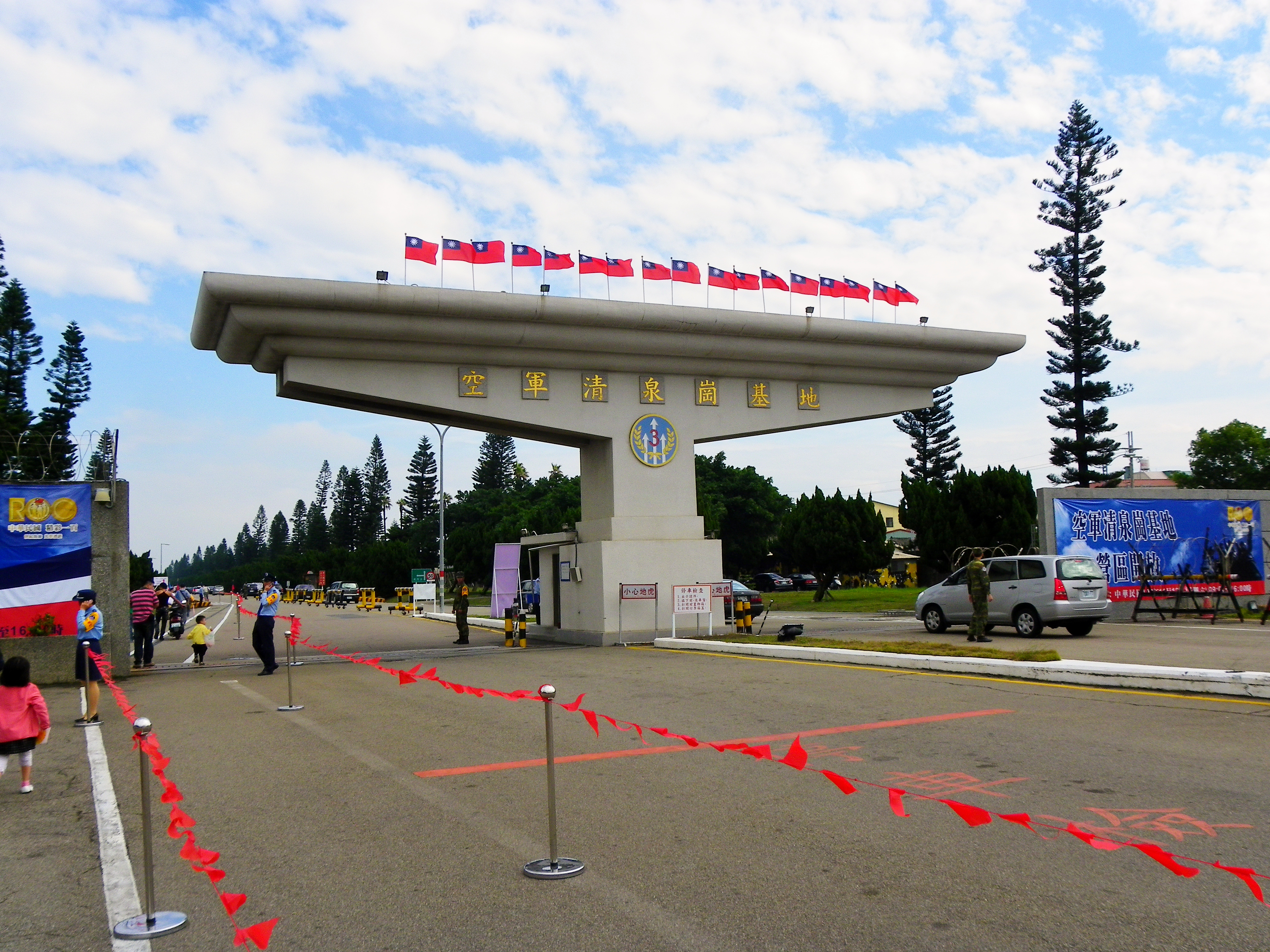 位於臺中市大雅區的空軍清泉崗基地大營門，攝於2011年營區開放活動。